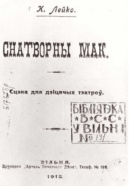 Кандрат Лейка